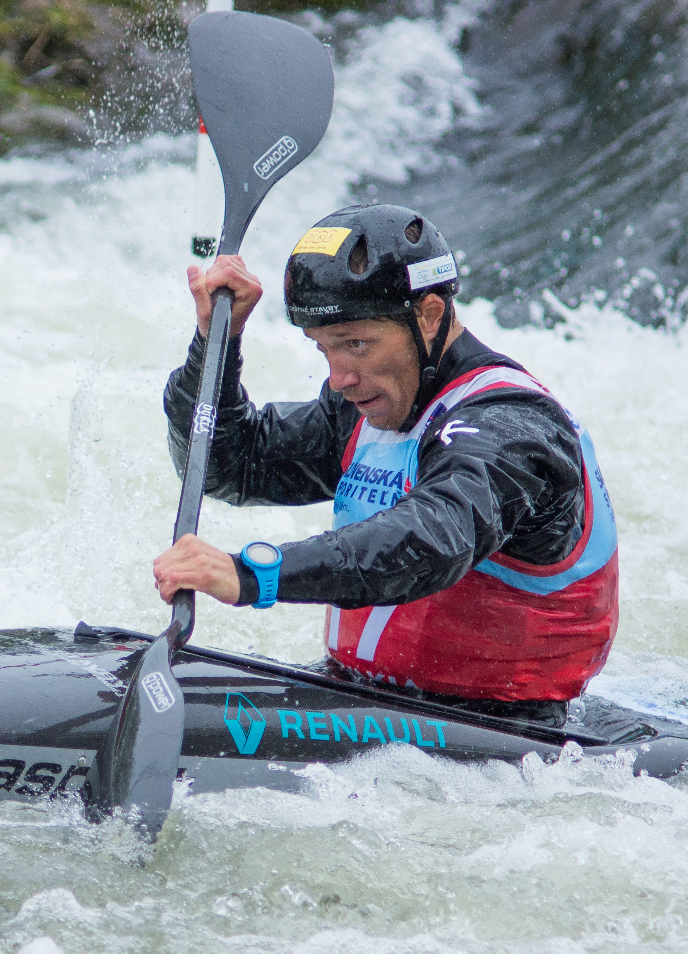 Martin Halčin